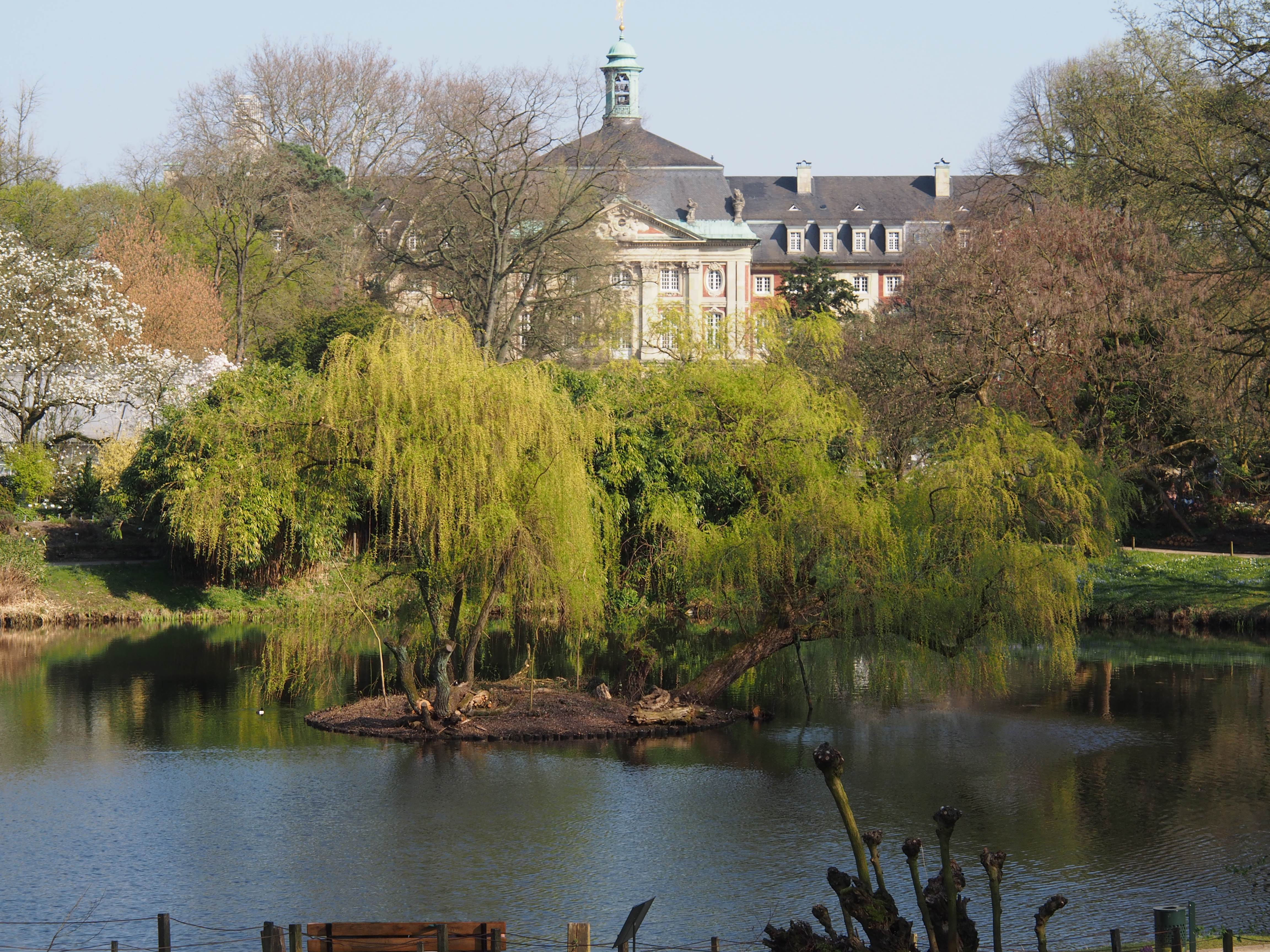 Botanischer Garten mit Teich, im Hintergrund das Schloss Münster (Westfalen)